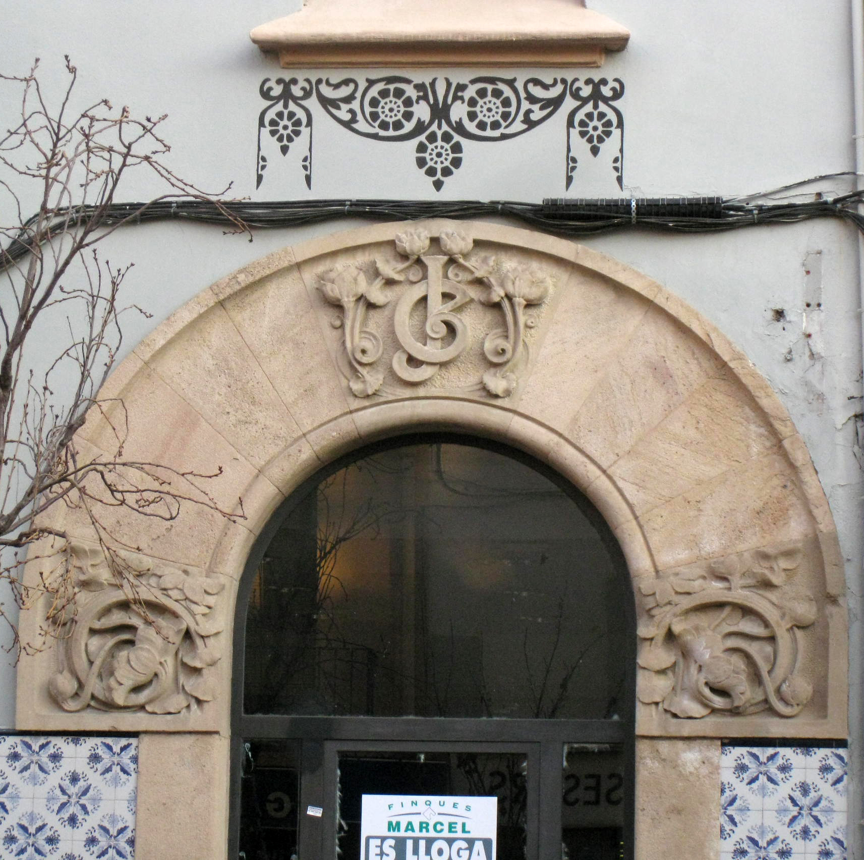 Casa Josefa Ganduxer de Torras (Granollers) Object location41° 36′ 38.75″ N, 2° 17′ 22.39″ E